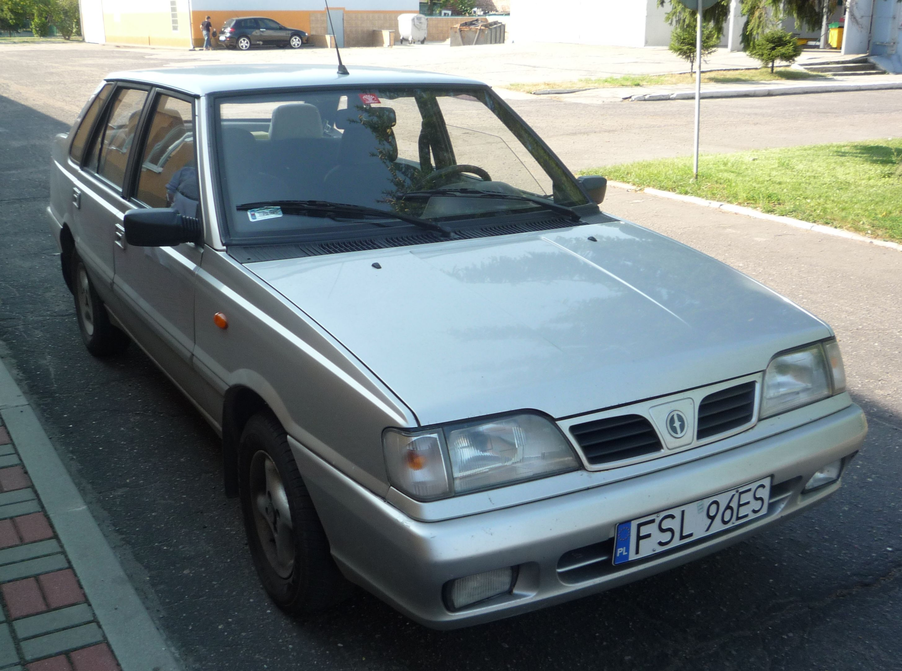 Daewoo-FSO Polonez Atu Plus 1.6 GLI w Słubicach.